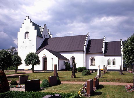 Våxtorps kyrka i södra Halland. Foto: Åke Johansson